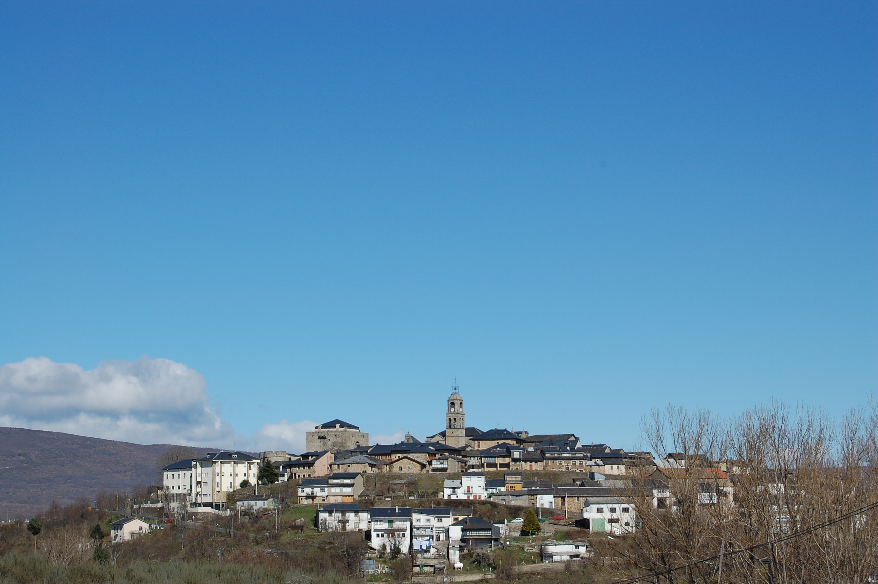 Puebla de Sanabria (Póvoa de Seabra), província de Zamora, Espanha.